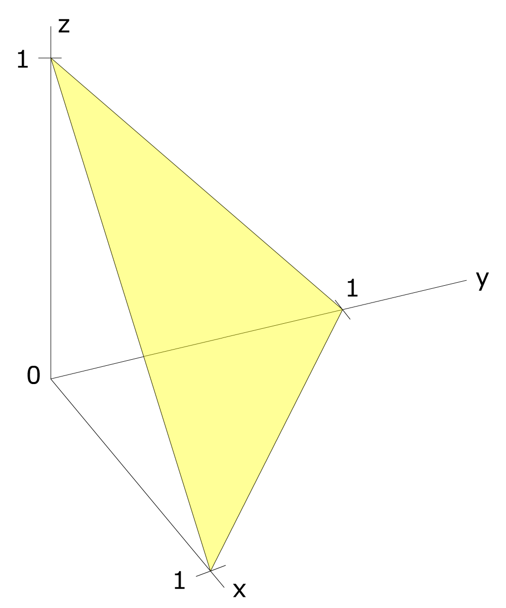 Miller Index 111